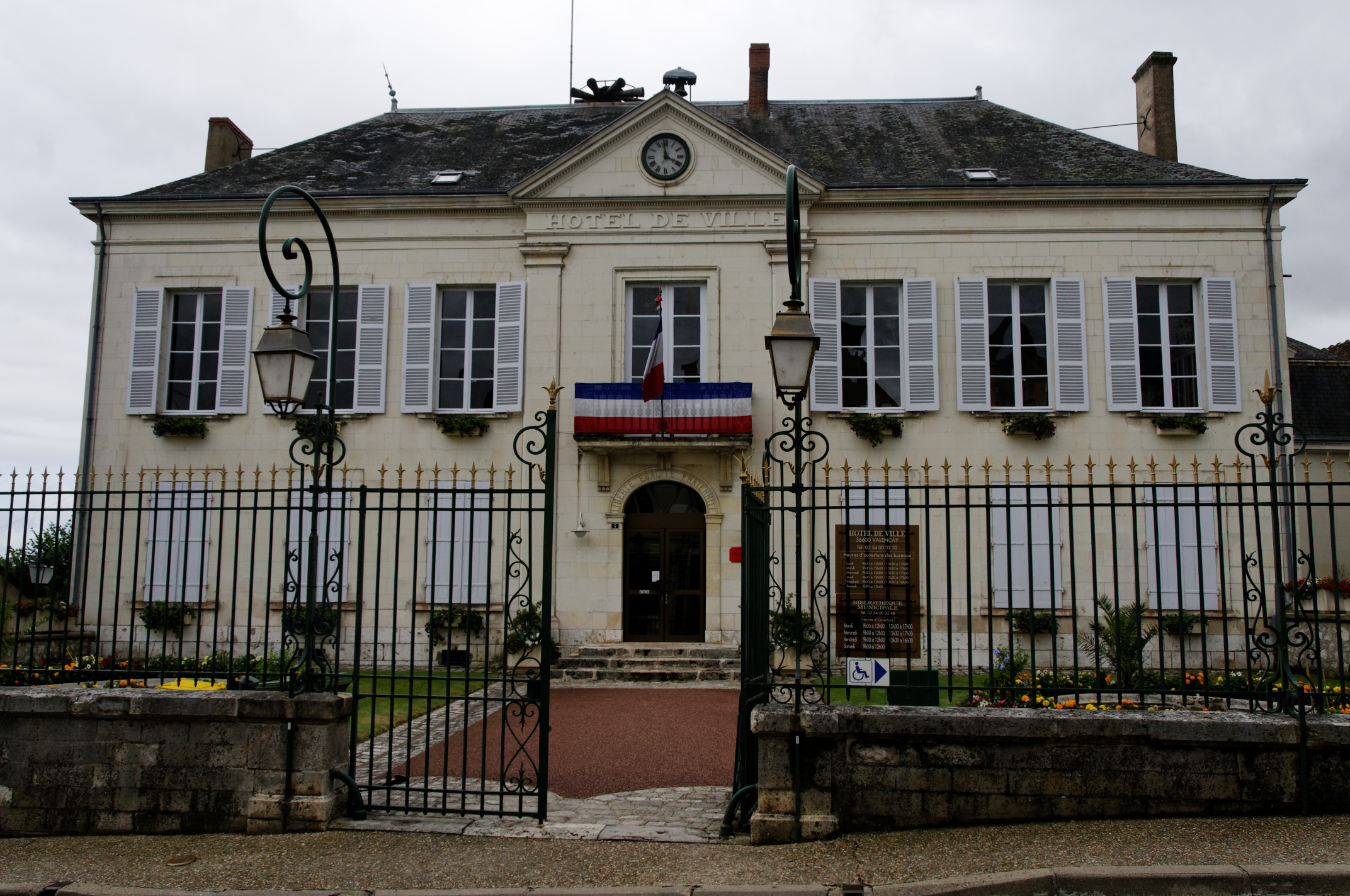 Hôtel de ville, Valençay, Indre, France